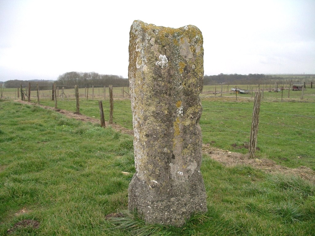 Menhir dit de "La Pierre Debout" en bord de route à proximité de Colombiers-sur-Seulles (Calvados) - France